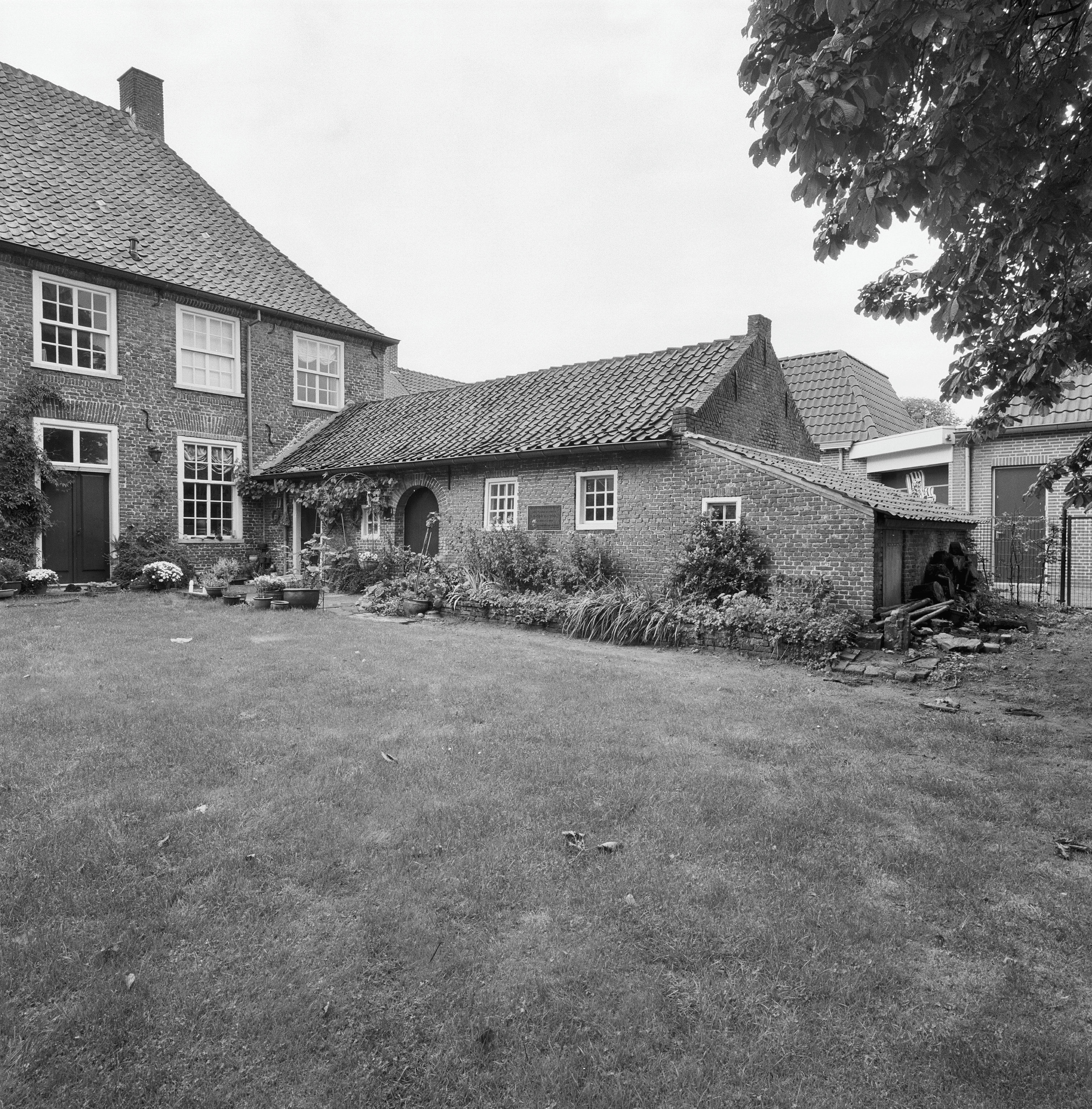 Voormalige Pastorie / Werkatelier En Woonhuis Geweest Van Vincen: Overzicht schuur, voormalig atelier van van Gogh